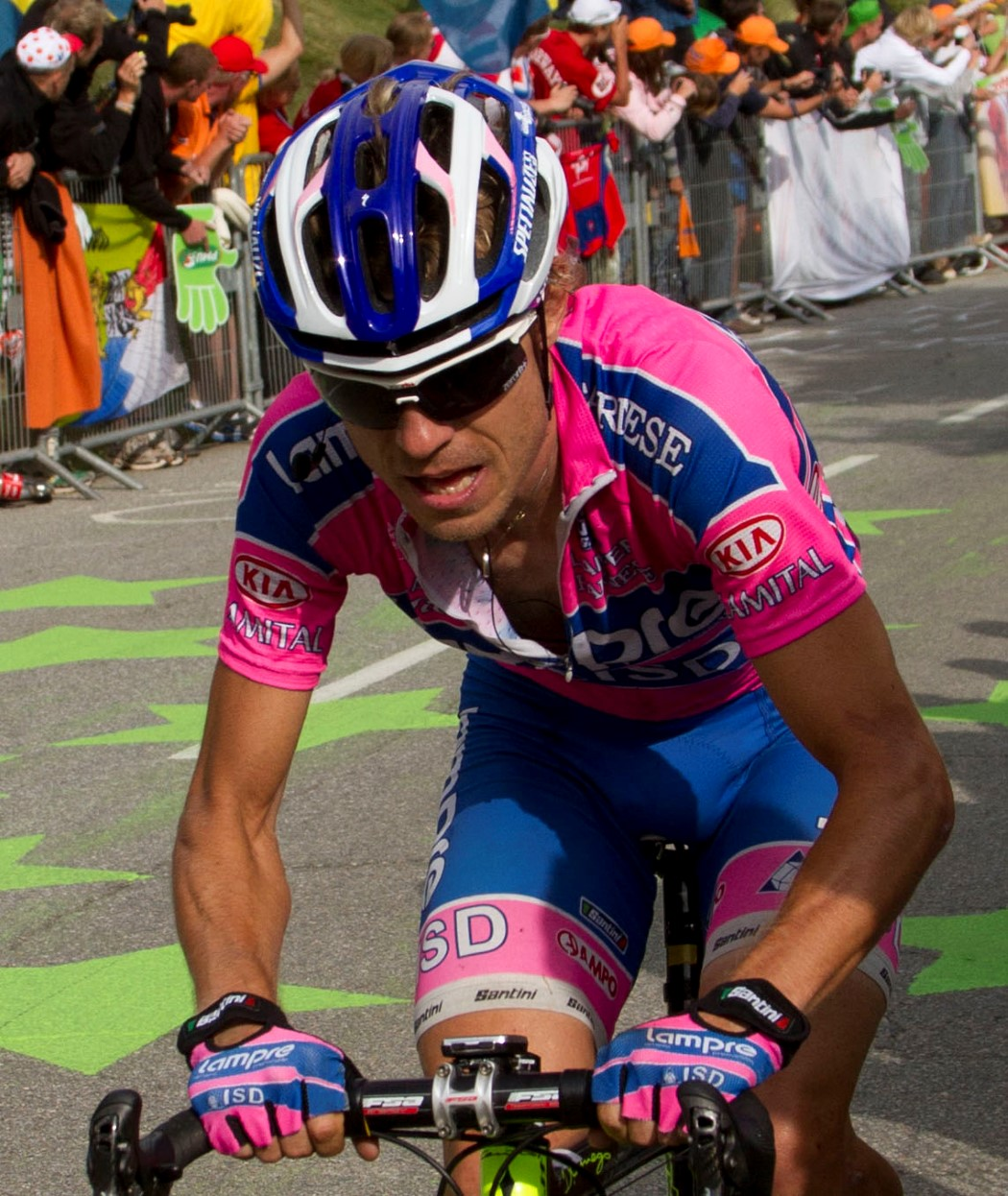 alpedhuez 071 cunego2